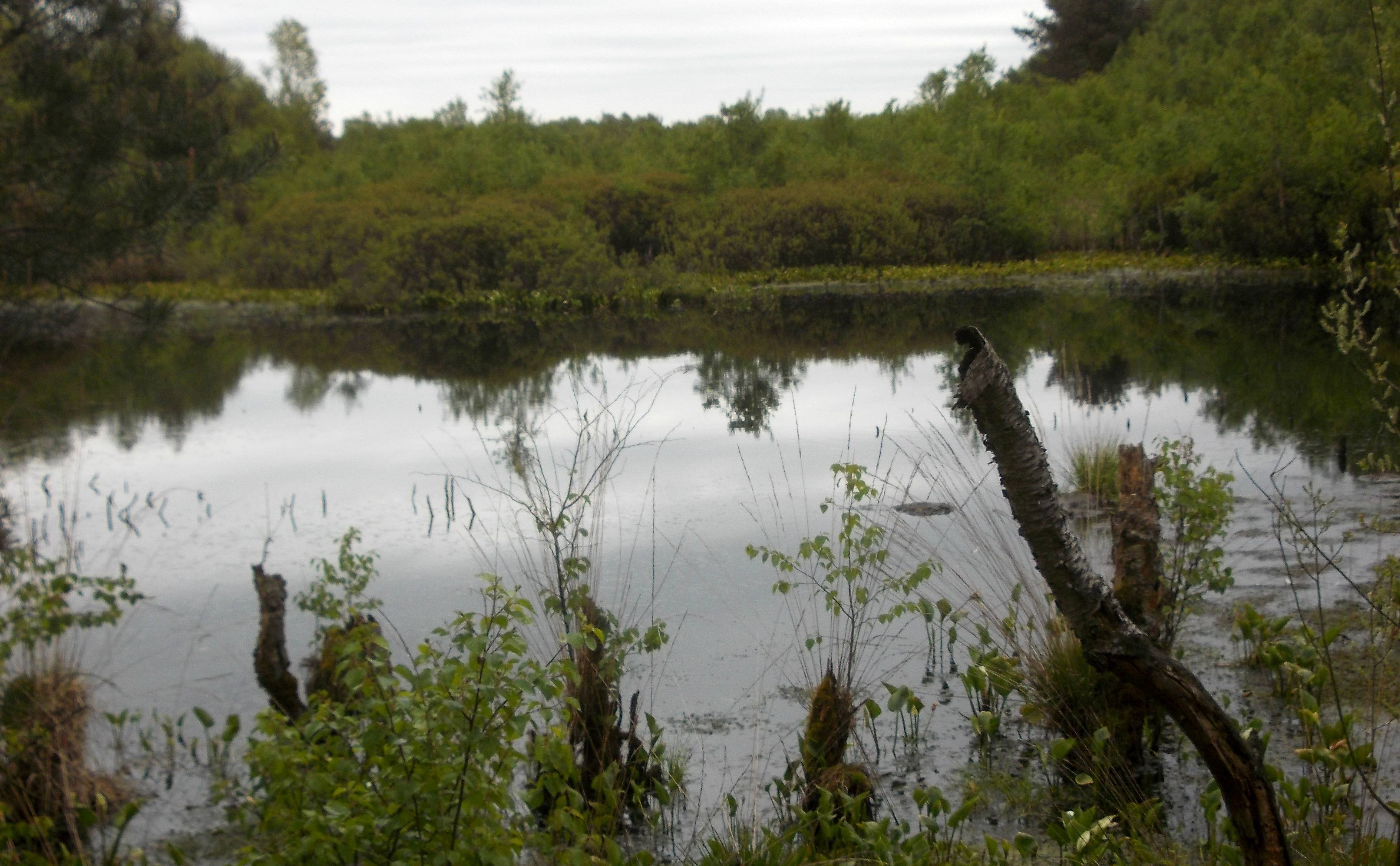 Vernässtes Königsmoor bei Hagen/Bremen